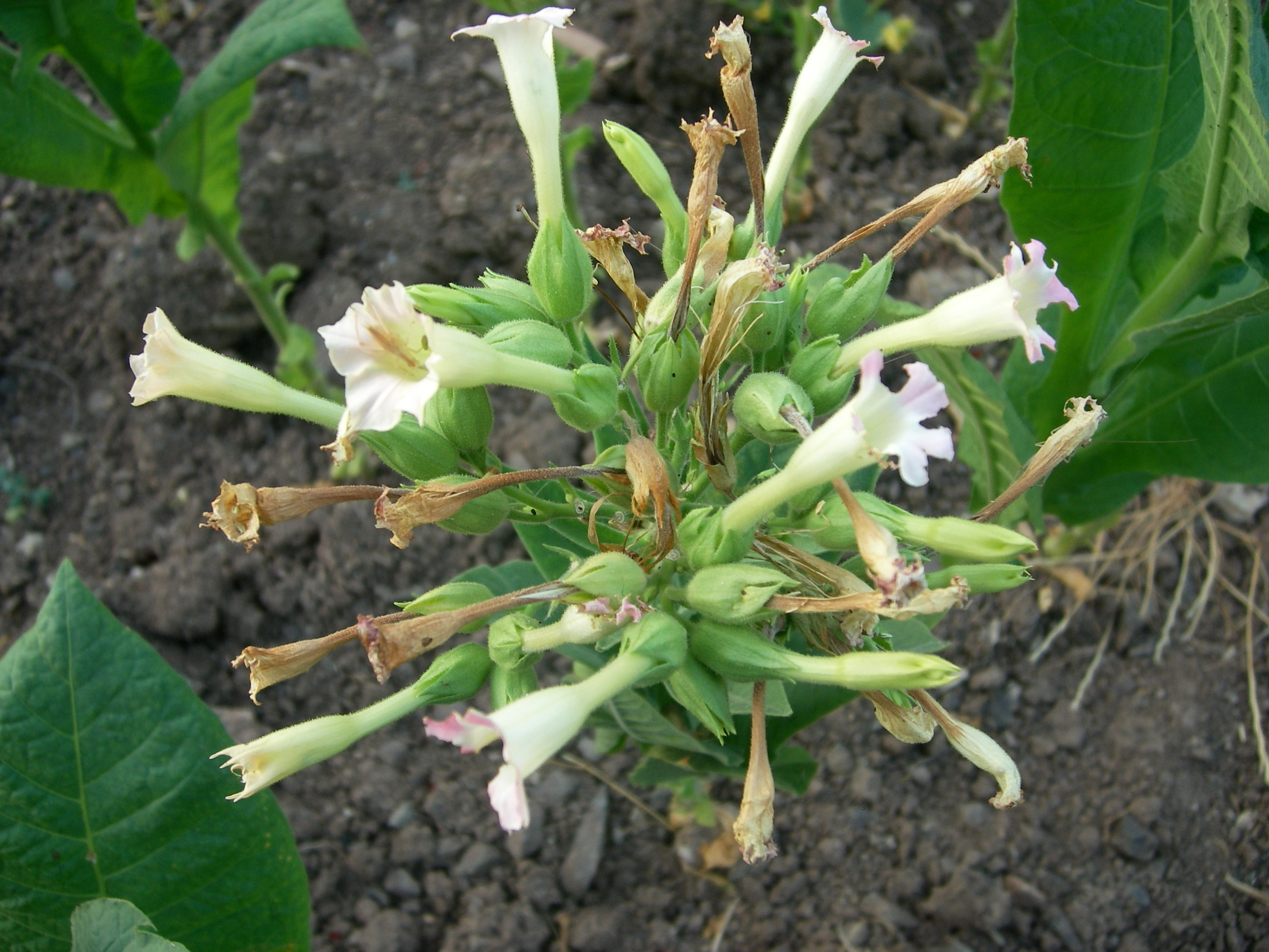 Yayladağı'ndan çeşitli görüntüler